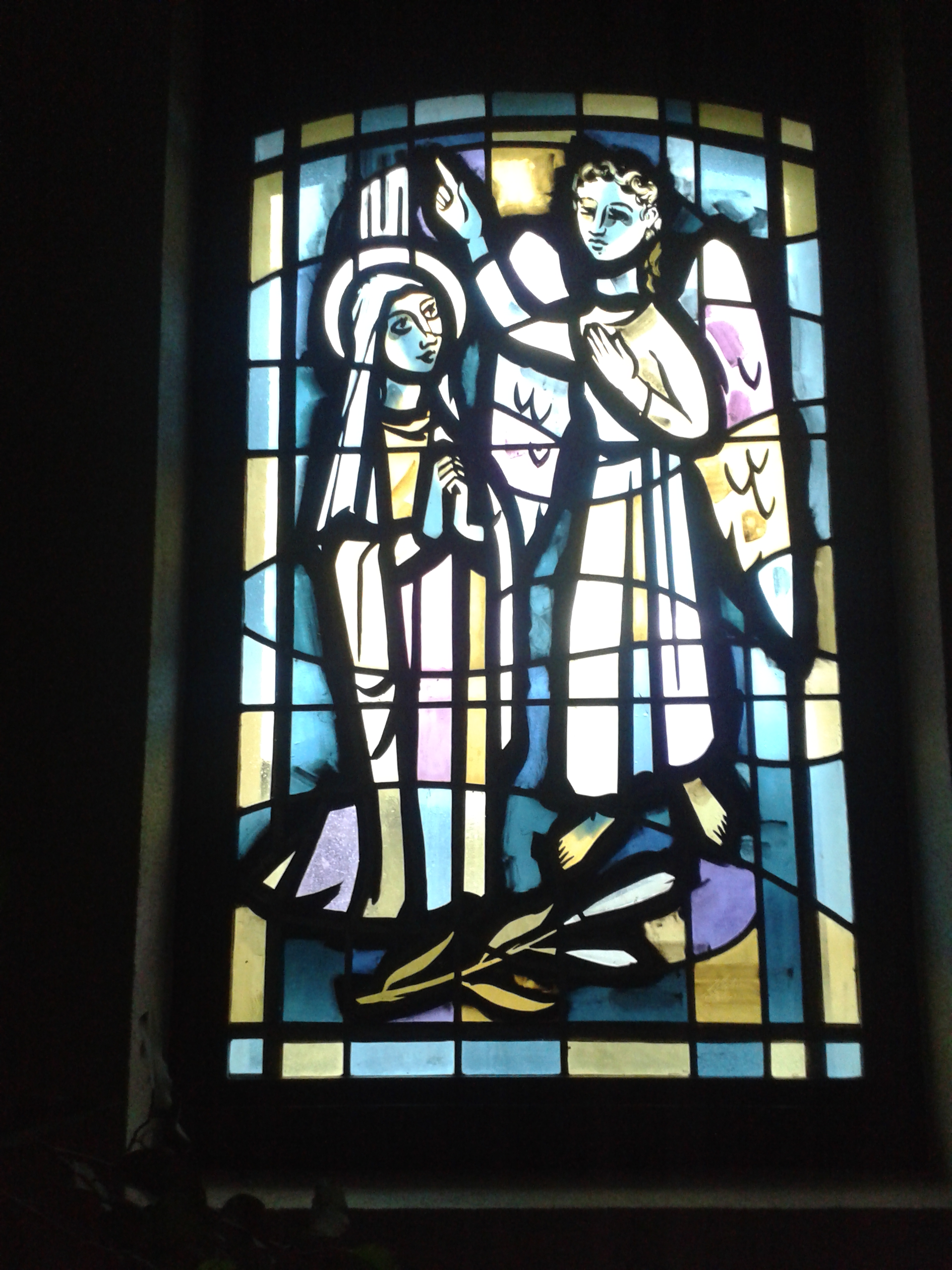 Vitrail de l'Annonciation, petite fenêtre latérale côté aval à proximité de l'entrée de l'édifice.